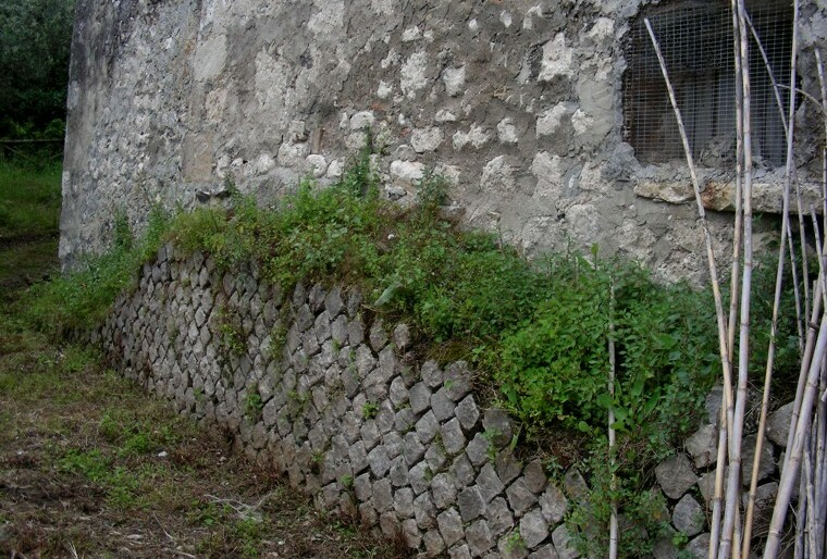 Un tratto della base del proscenio del teatro occupato da un edificio rurale